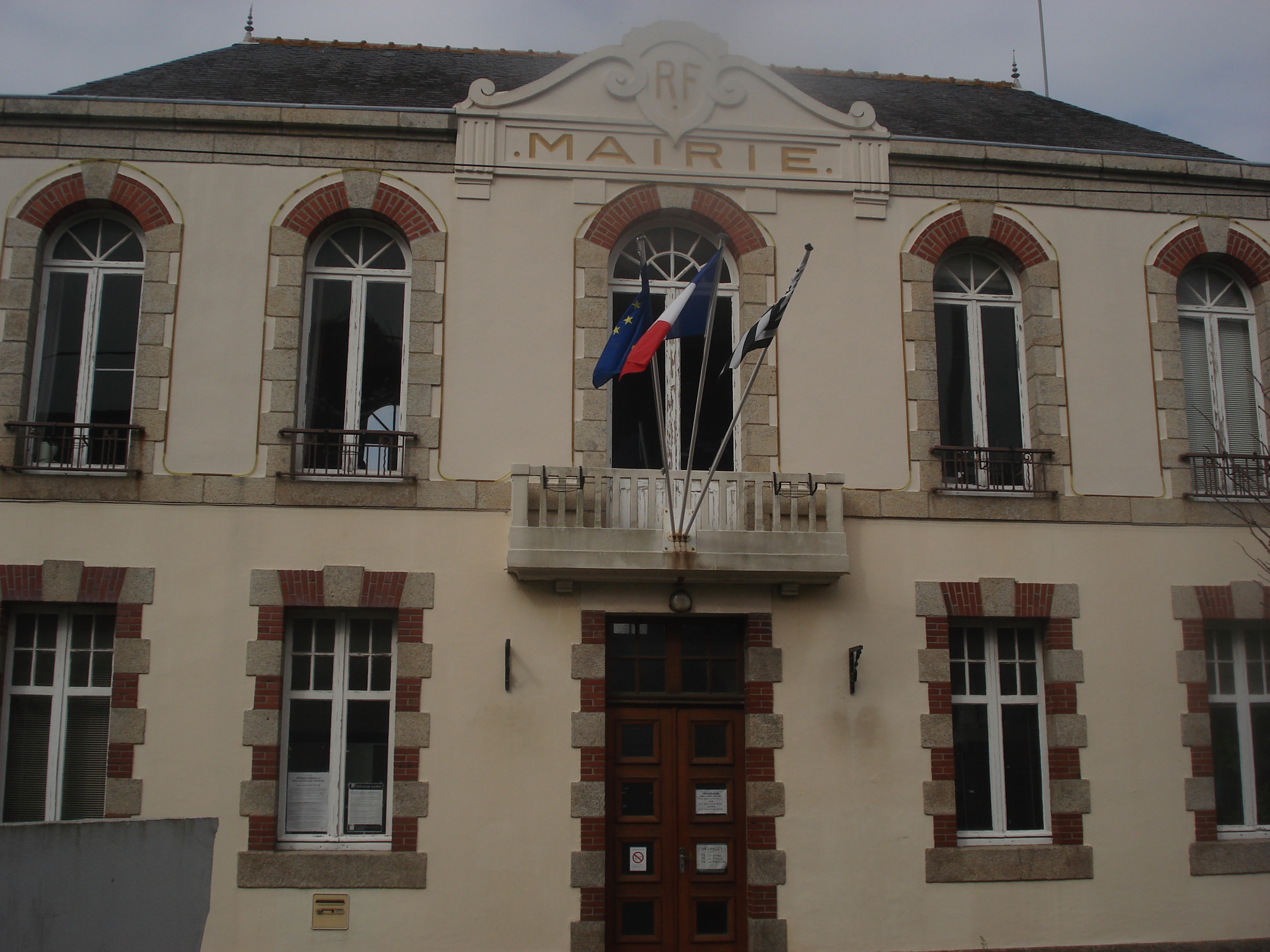 mairie de saint pierre quiberon